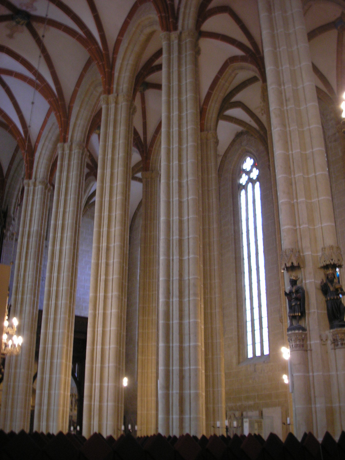 Der Innenraum der Marienkirche in Mühlhausen (Thüringen).